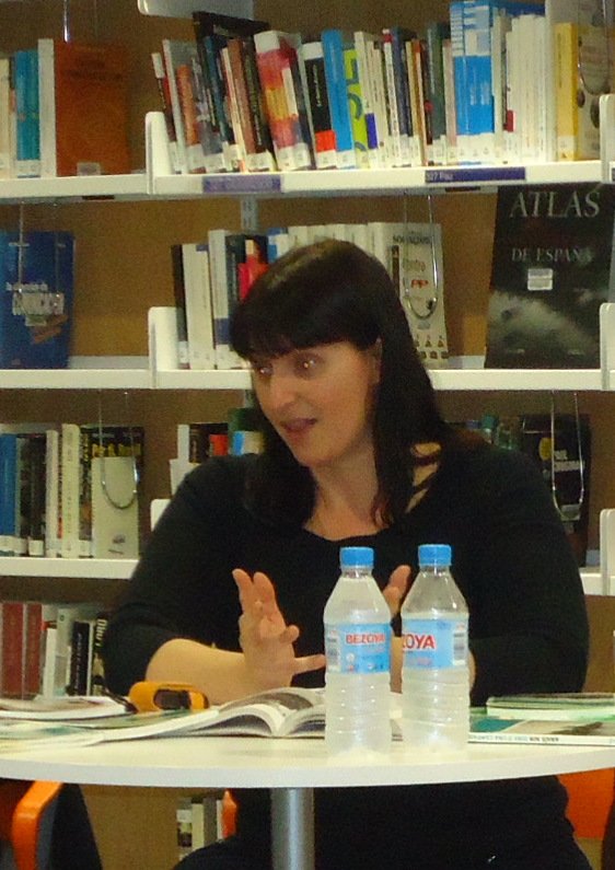 Esther Andorrà, editora de LaBreu Edicions a la biblioteca de Cambrils durant la presentació d'un llibre